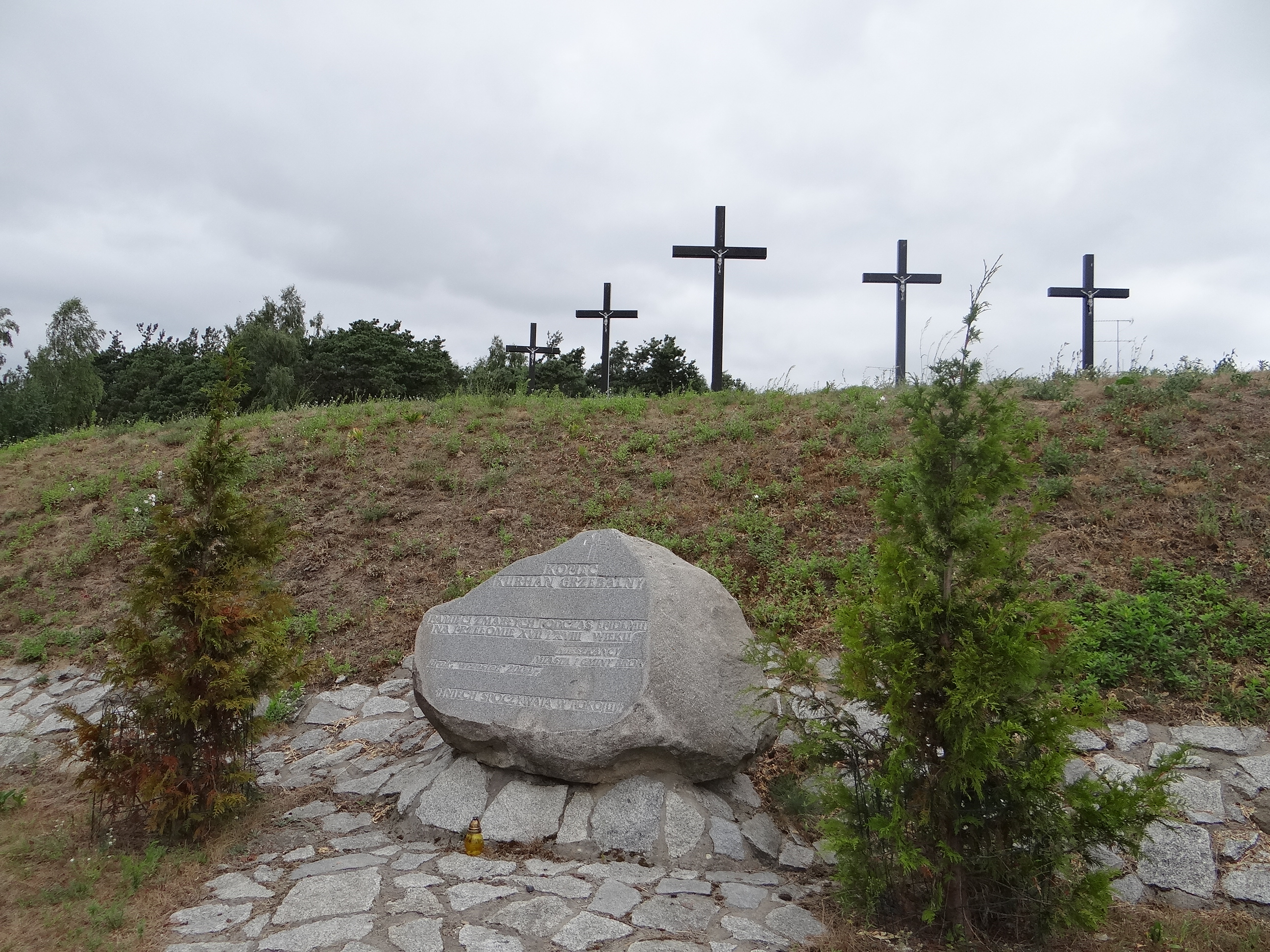 Kurhan grzebalny ofiar epidemii.